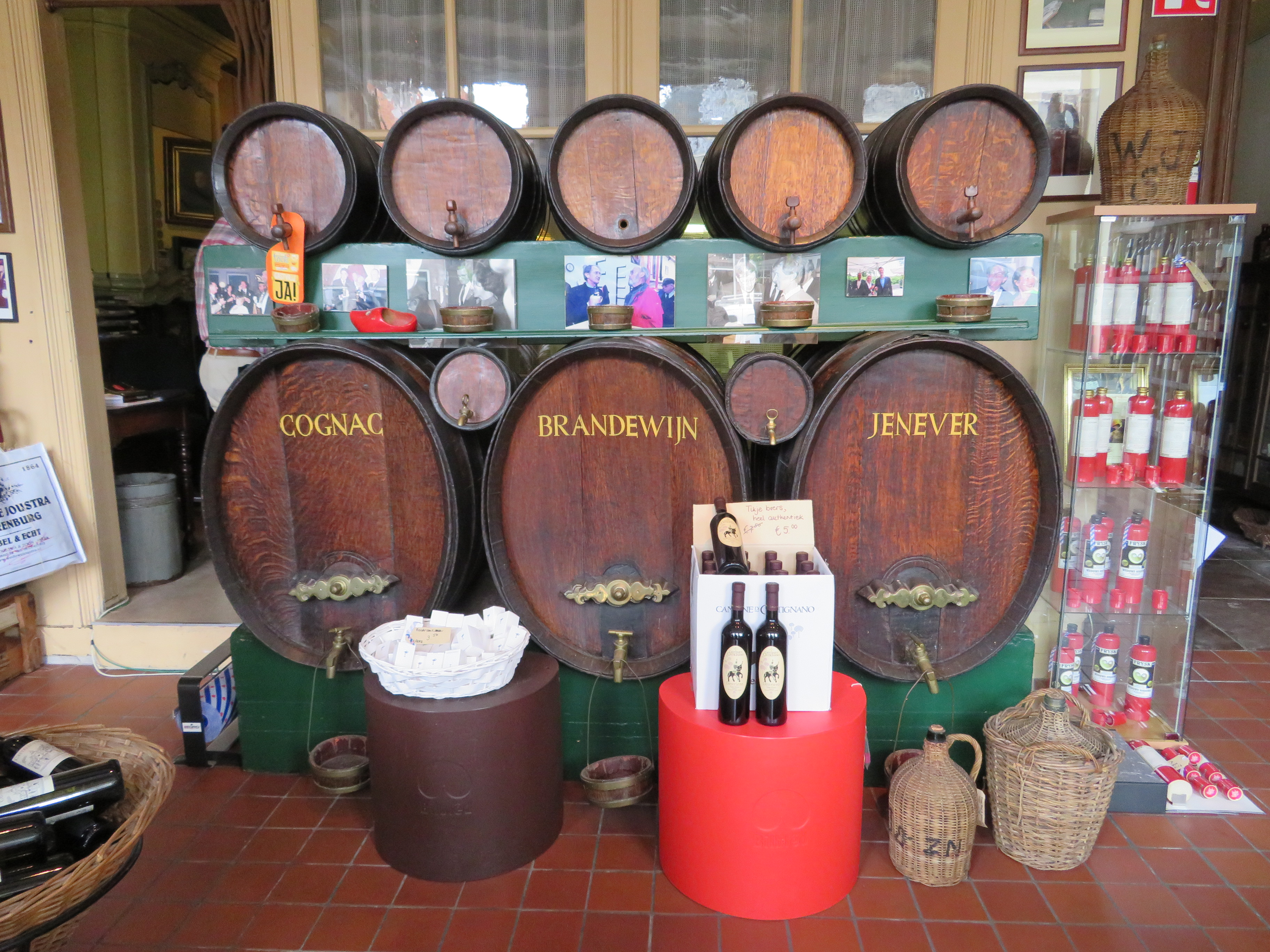 Interieur van het pand aan het Kleinzand in Sneek van Weduwe Joustra